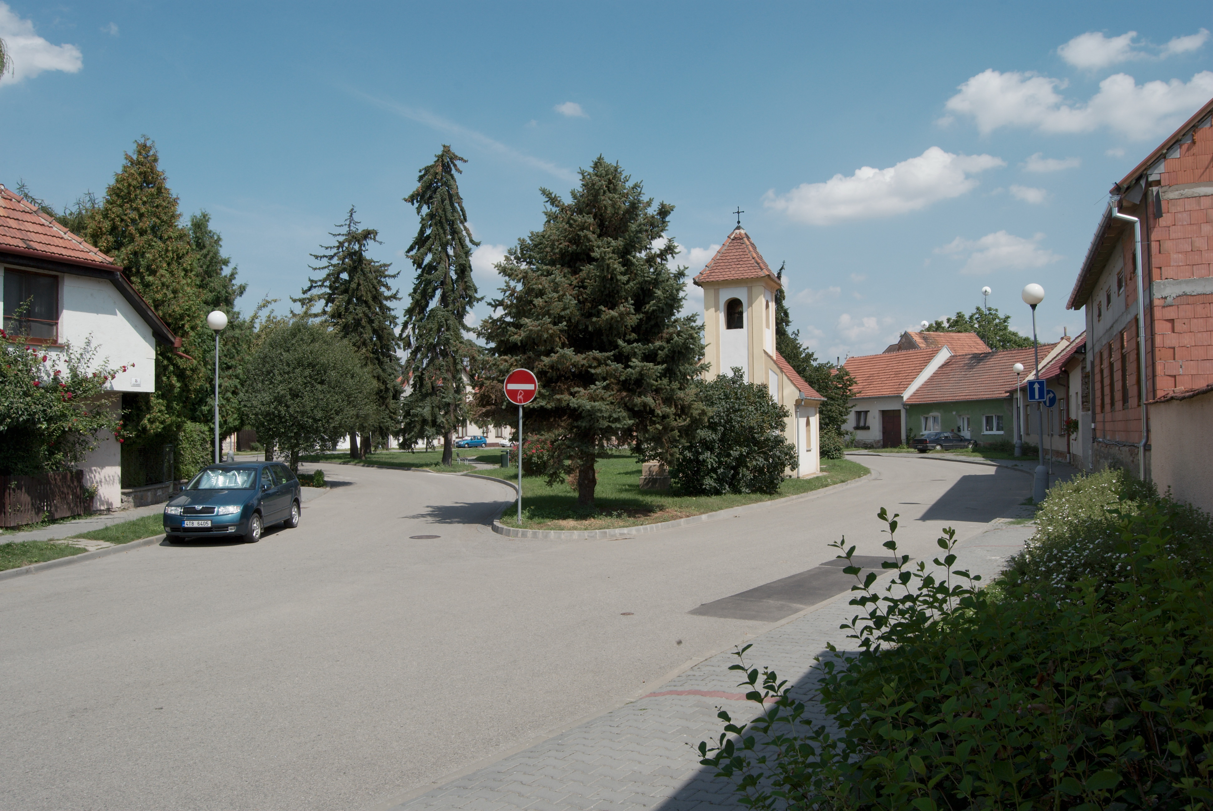 Brno-Dolní Heršpice - Jižní náměstí vyfotografované od západu